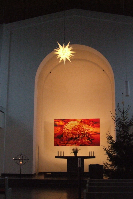 Die St. Matthäuskirche in Berlin-Tiergarten Ein temporäres Altarbild von Yang Shaobin Fotograf: Harald Rossa Datum: Januar 2007 Höher aufgelöste Version ist verfügbar